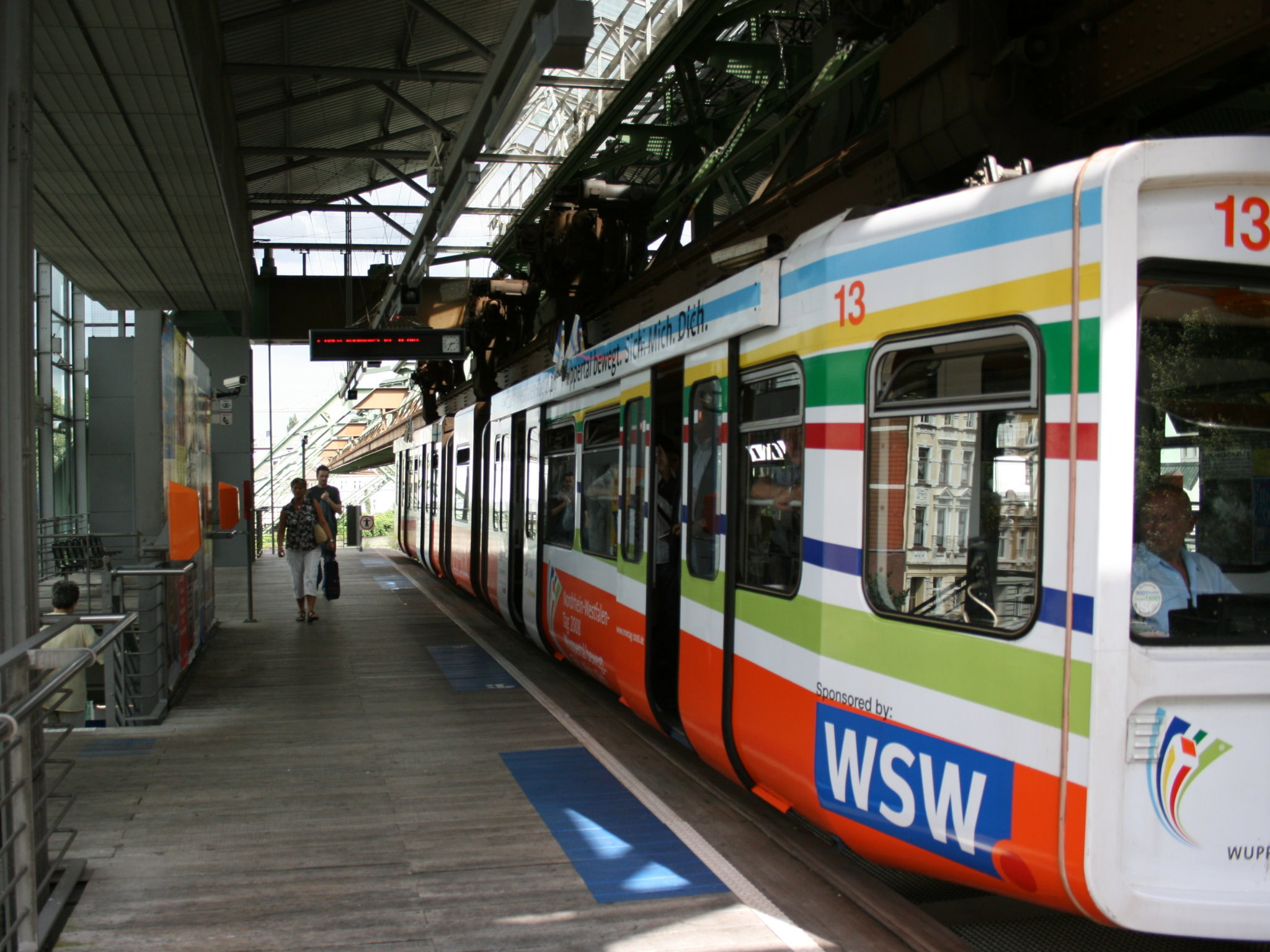 Schwebebahnstation Pestalozzistraße